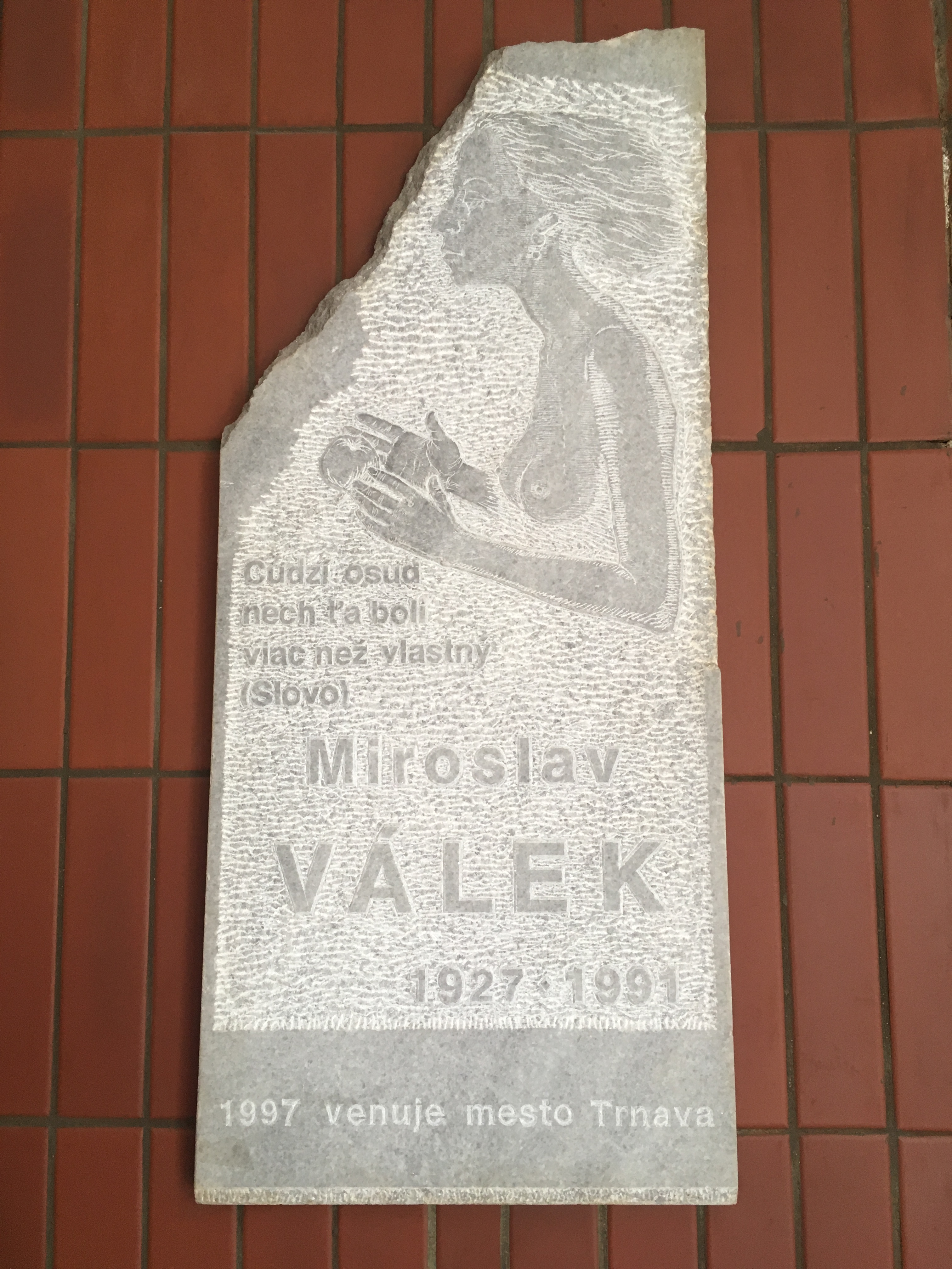 Pamätná tabula Miroslava Válka v Trnave